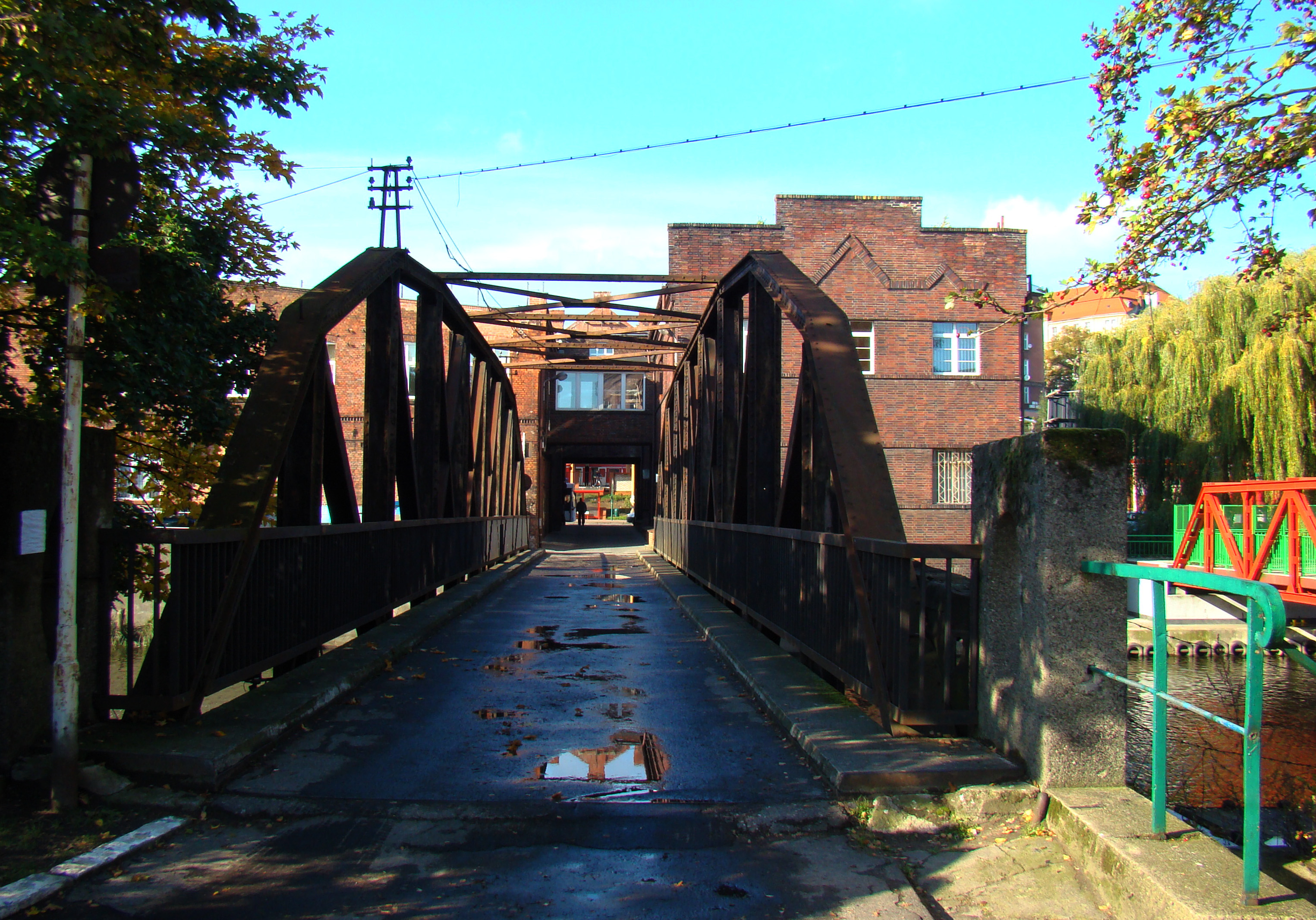 Most na Wyspę Jaskółczą, Szczecin, Polska